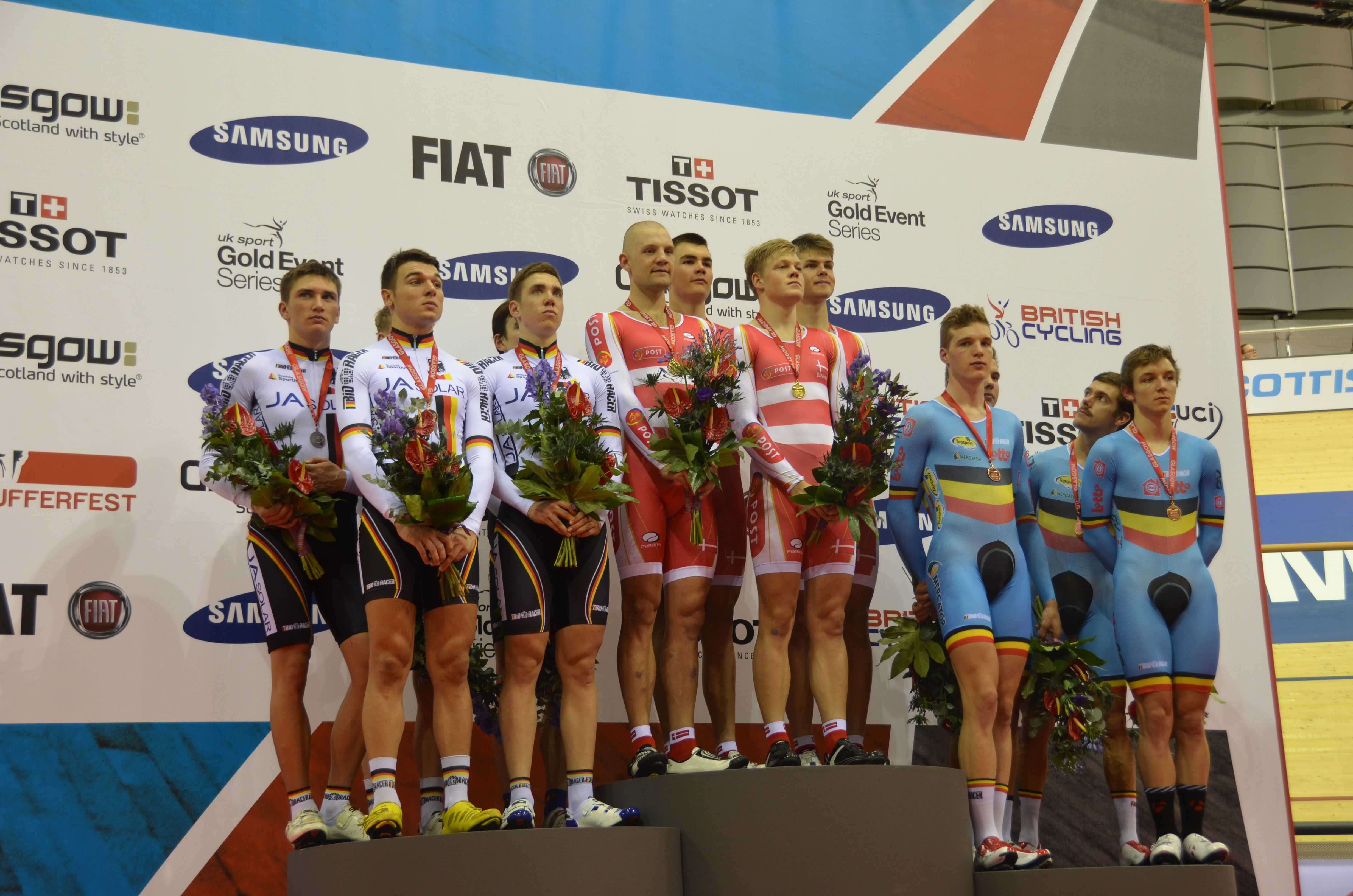 Bahnrad-Weltcup 2012. v.l.n.r.: Lucas Liß, Kersten Thiele, Maximilian Beyer